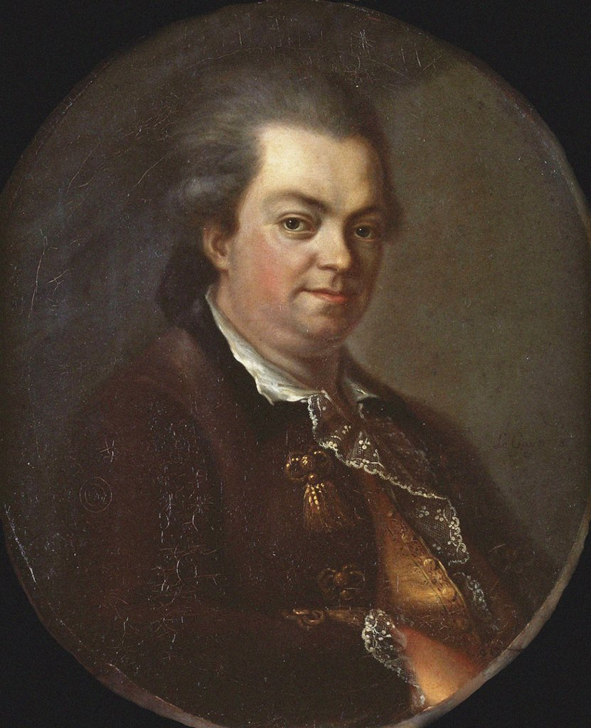 Joseph Balsamo (1743-1795), comte de Cagliostro